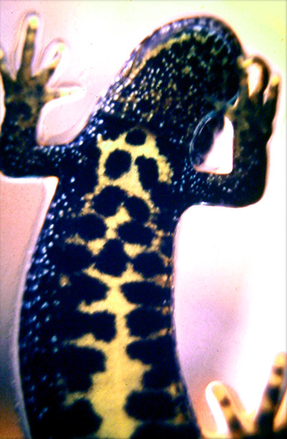 Triton à crête, vue de dessous, Plateau d'Helfaut (nord de la France, en 1991). Les taches permettent d'identifier un individu et de le suivre durant plusieurs années. Espèce protégée